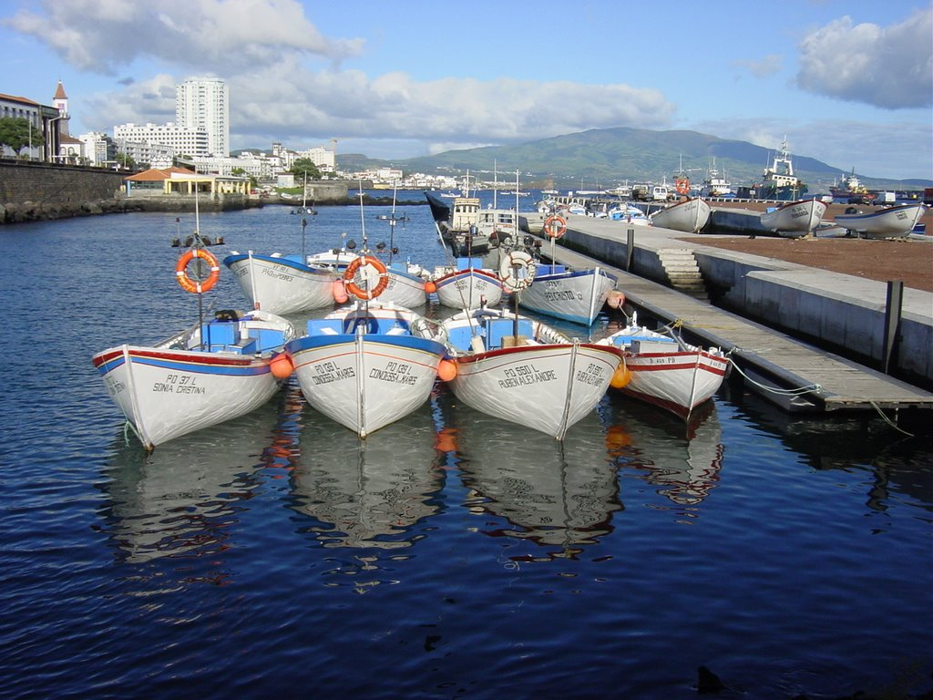 Ponta Delgada